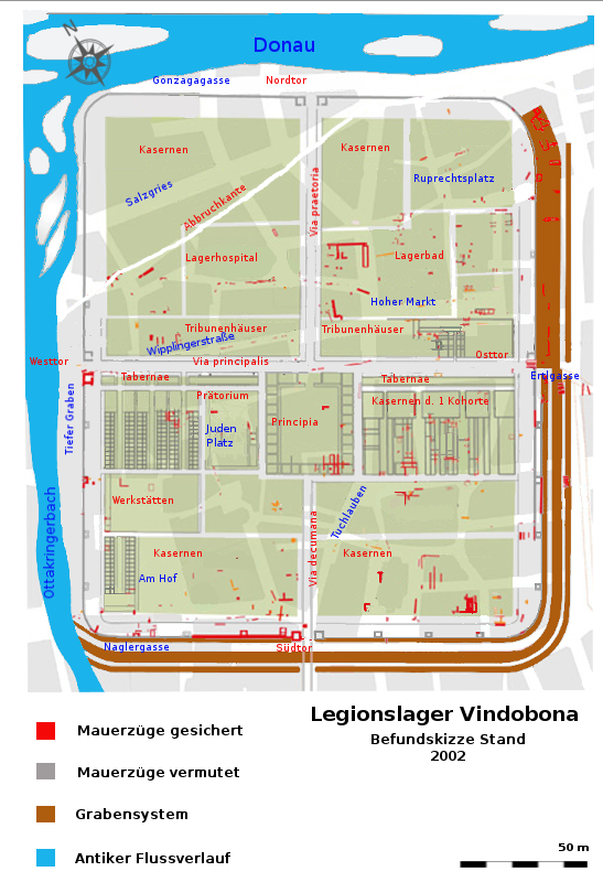 Befundskizze des Legionslagers Vindobona (Wien) um 130 n.Chr., Stand der Befunde 2002.